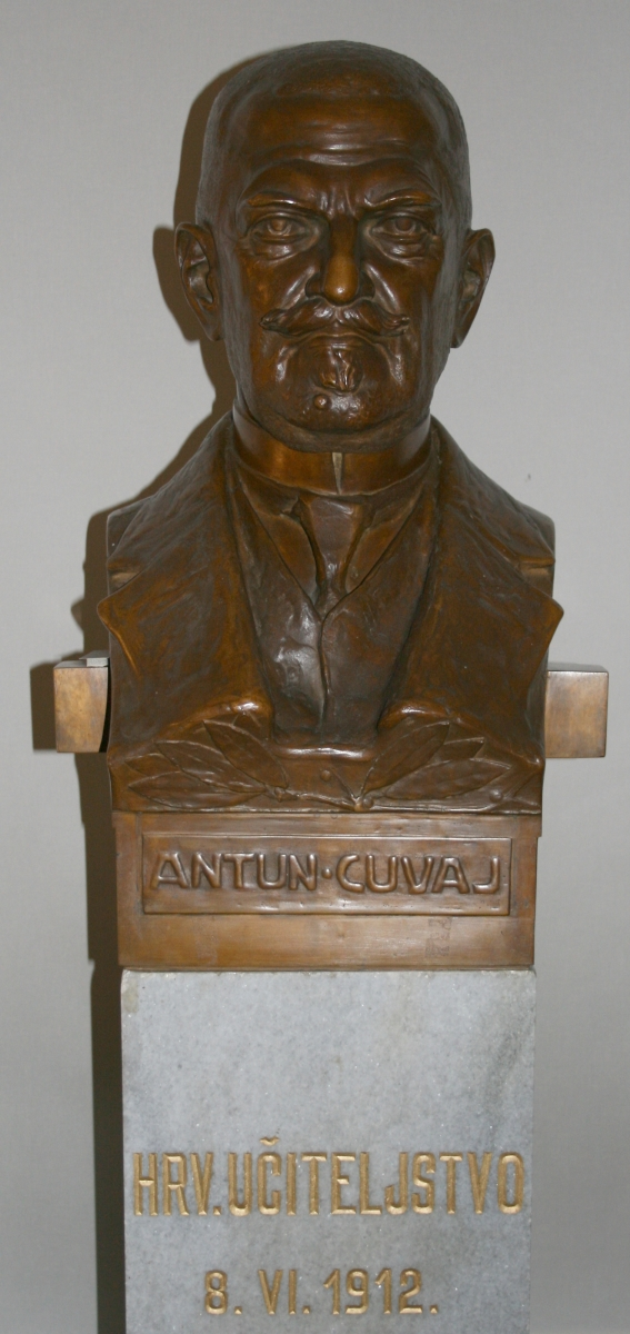 snimljeno tijekom Noći muzeja